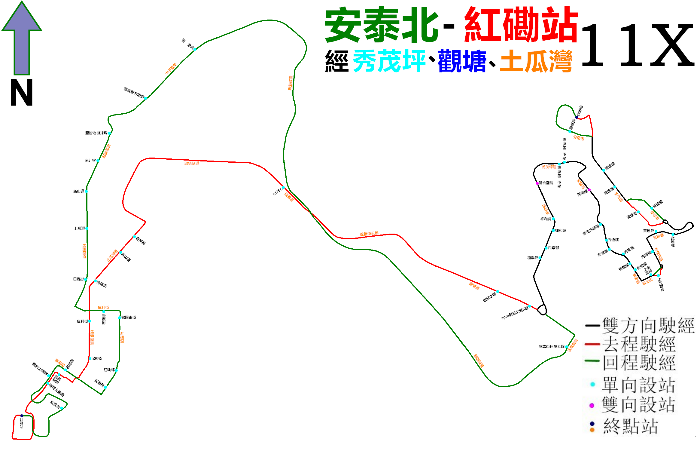 中文（香港）: 九巴11X線的走線圖